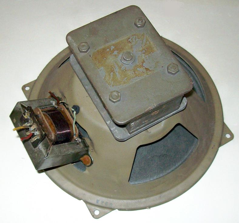 Ausgangsübertrager eines Röhrenradios, am dynamischen Lautsprecher montiert